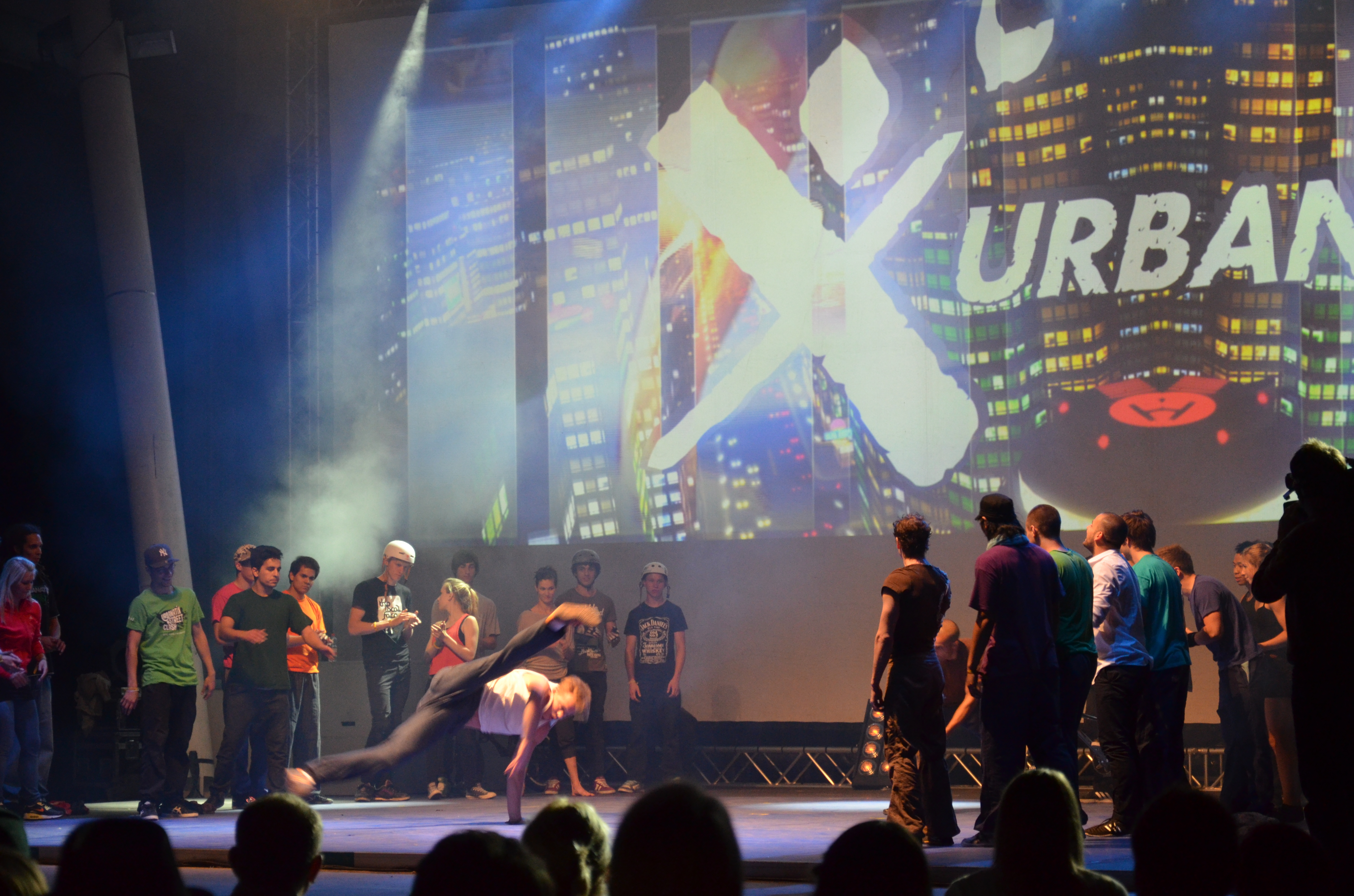 Urbanatix Show im Amphitheater des Nordsternpark (Gelsenkirchen) während der Extraschicht 2011